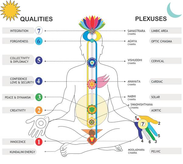 Ubicación y nombre de los 7 chakras.